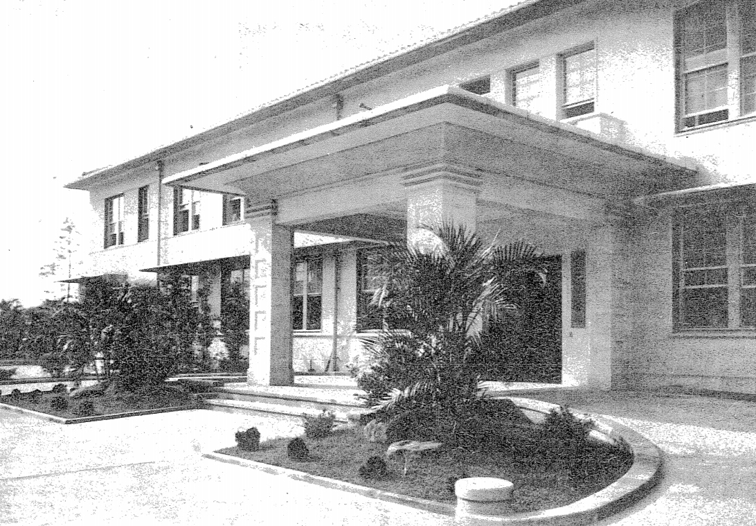 中文（台灣）: 1940年竣工的臺北鐵道醫院，位於台北市幸町，圖為醫院建築正面玄關。